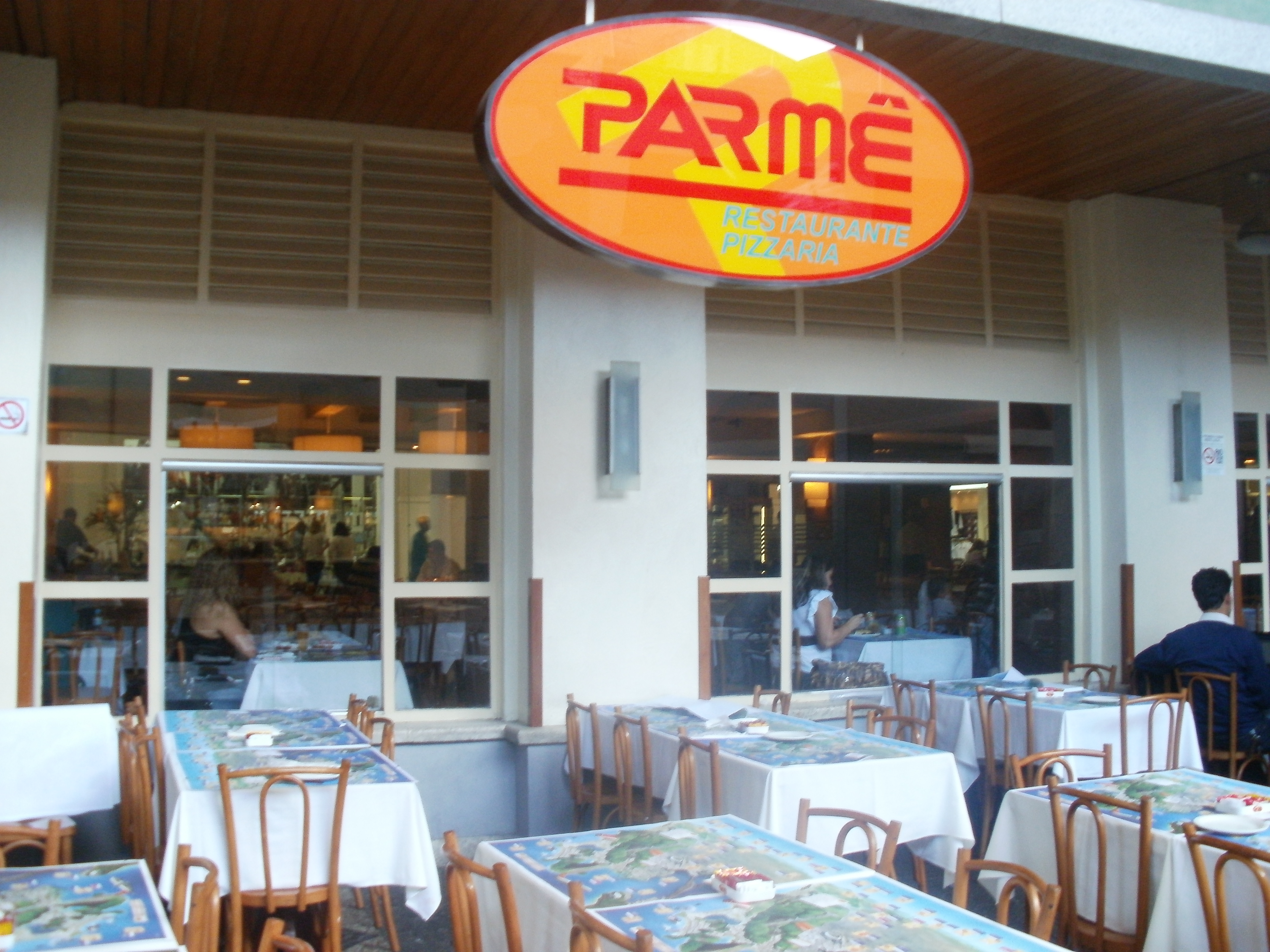 Parmê do Shopping Nova América, Del Castilho, Rio de Janeiro, Brasil.